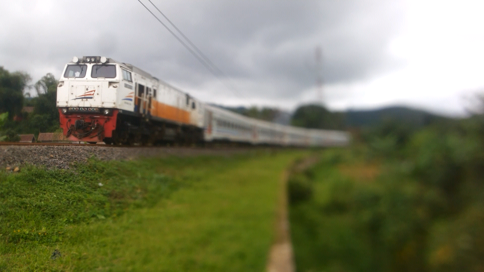 KA Siliwangi dengan no.KA 457 melewati Petak Gongsol GDL-CRG